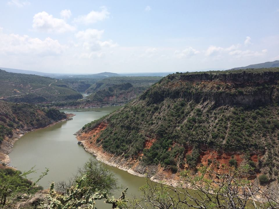 Vista hacia la zona de pesca del Río Moctezuma desde la iglesia de Xodhé